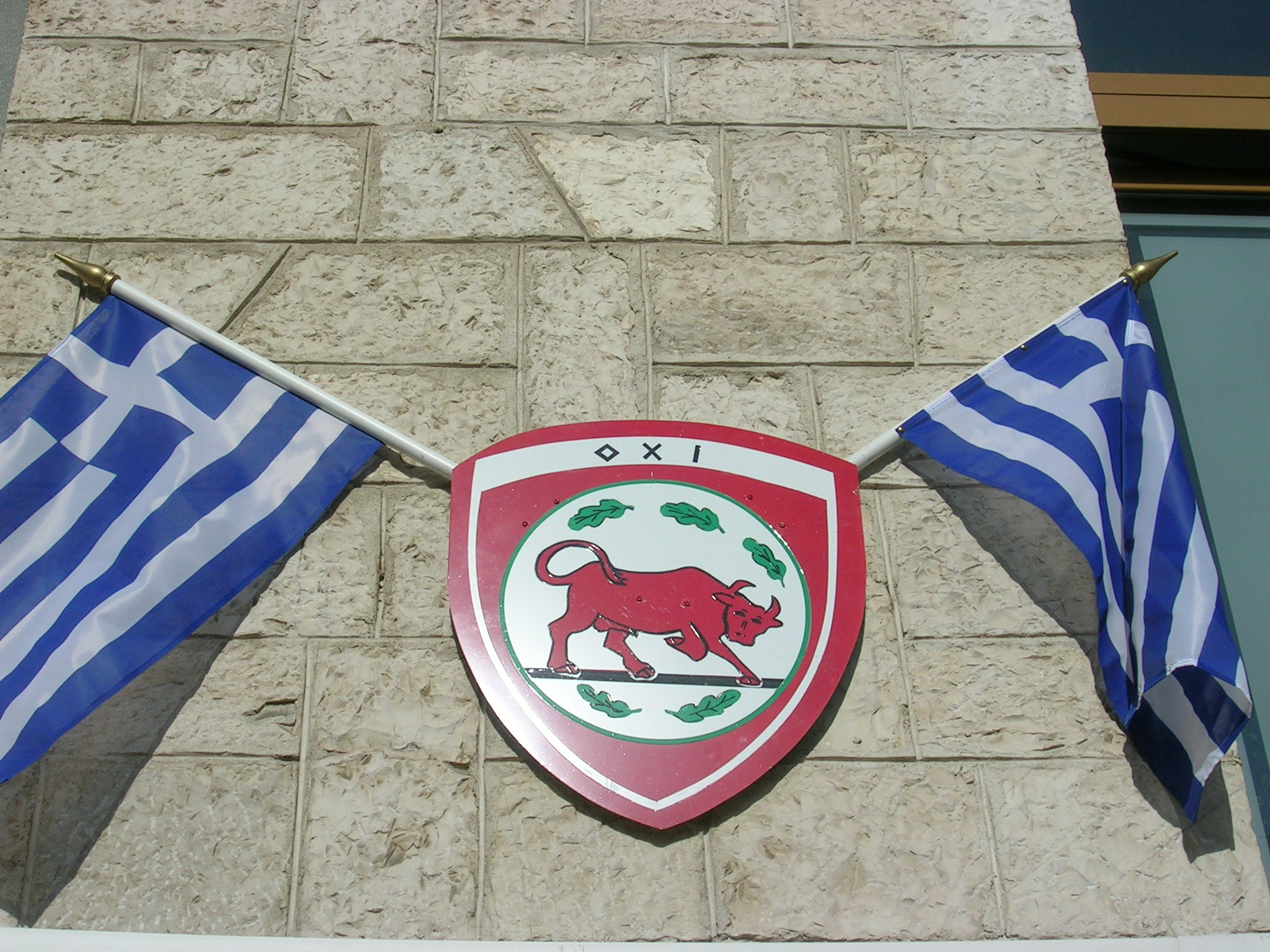 Ελληνικές σημαίες και έμβλημα της VIII Μεραρχίας Πεζικού Ηπείρου, με το σύνθημα "Όχι"